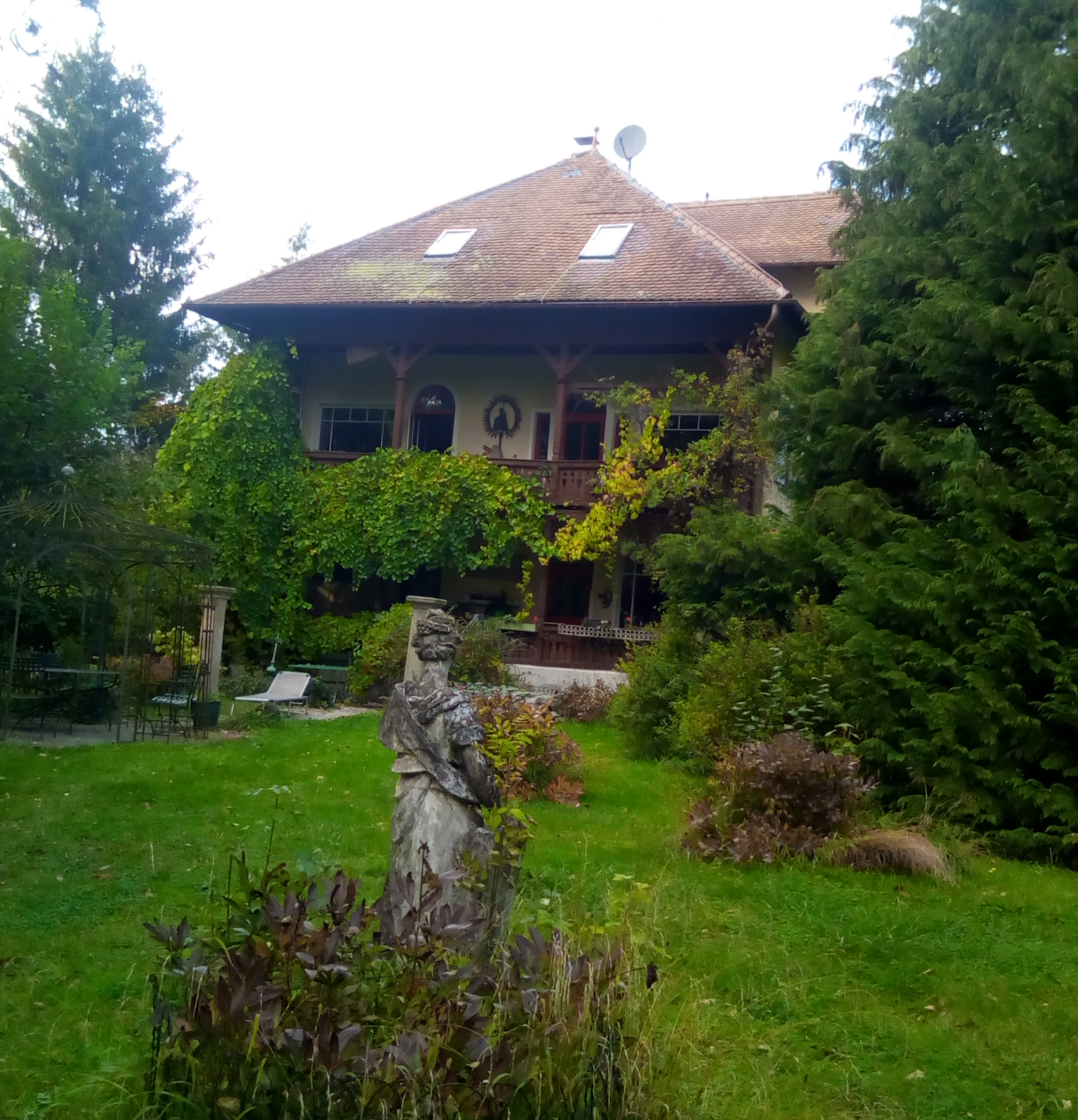 Garten der Villa-Buttersack-Bergmann